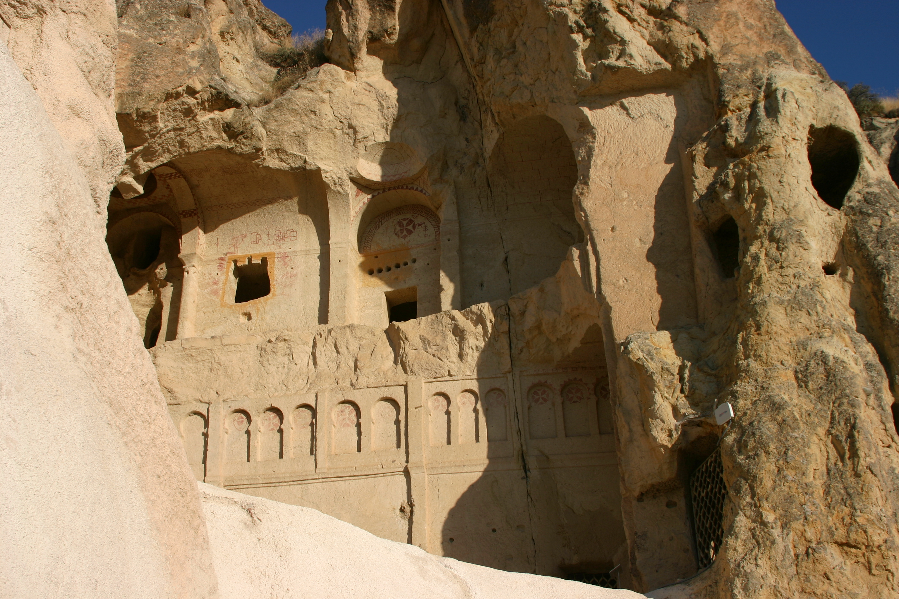 Karanlik kilise, em Goreme